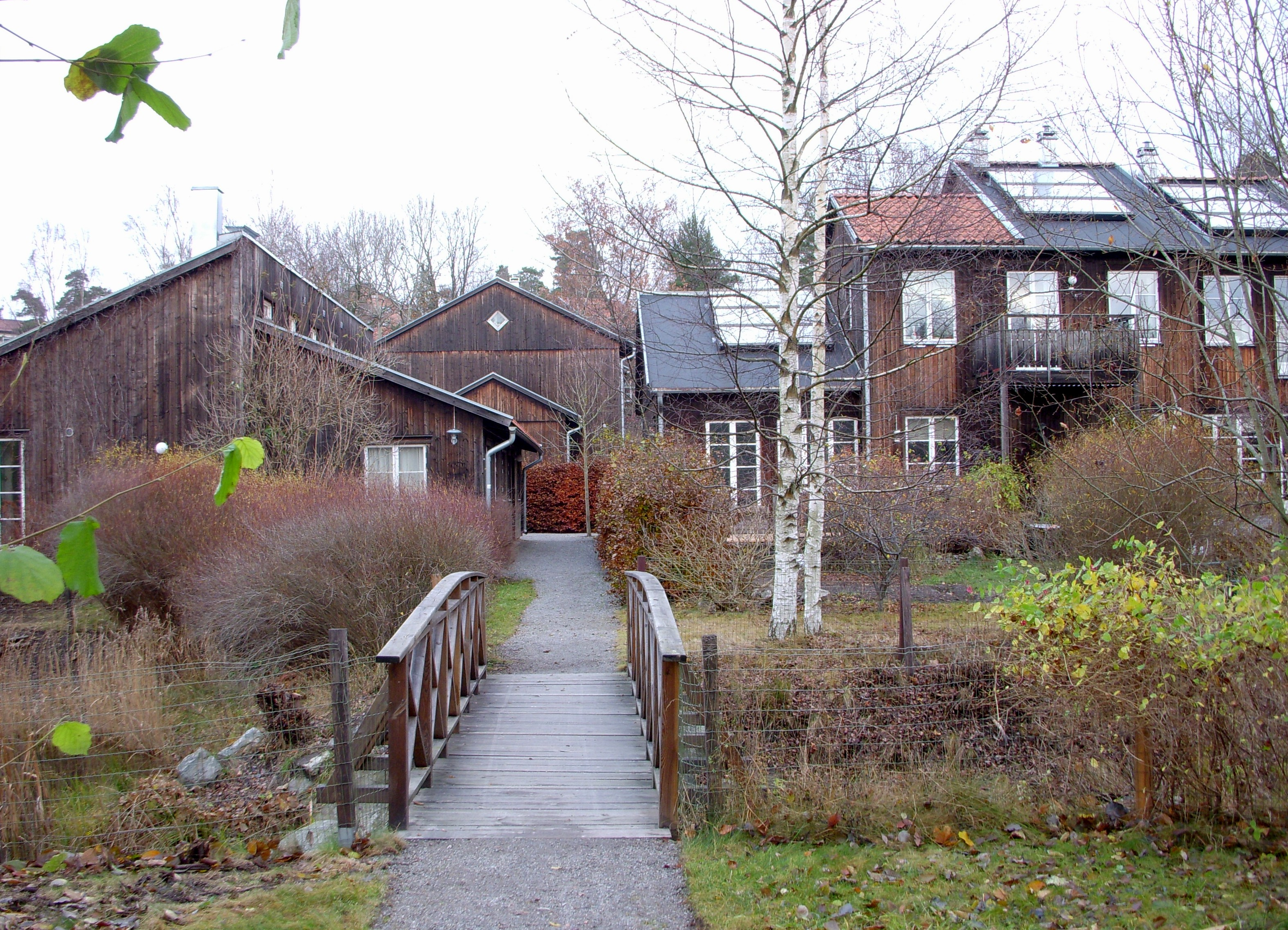 Bostadsområdet "Understenshöjden" i Björkhagen, Stockholm